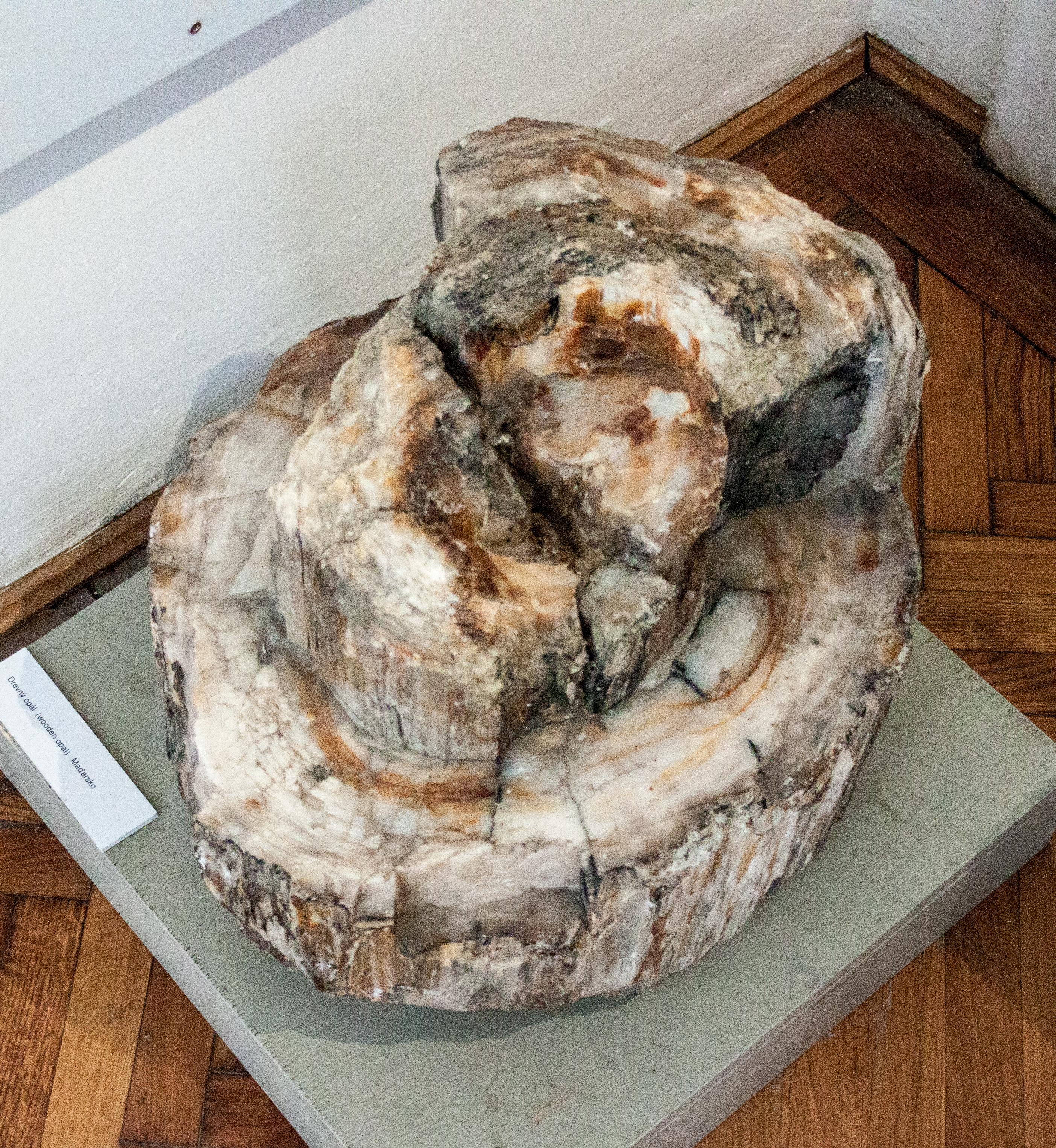 Wood opal, Hungary